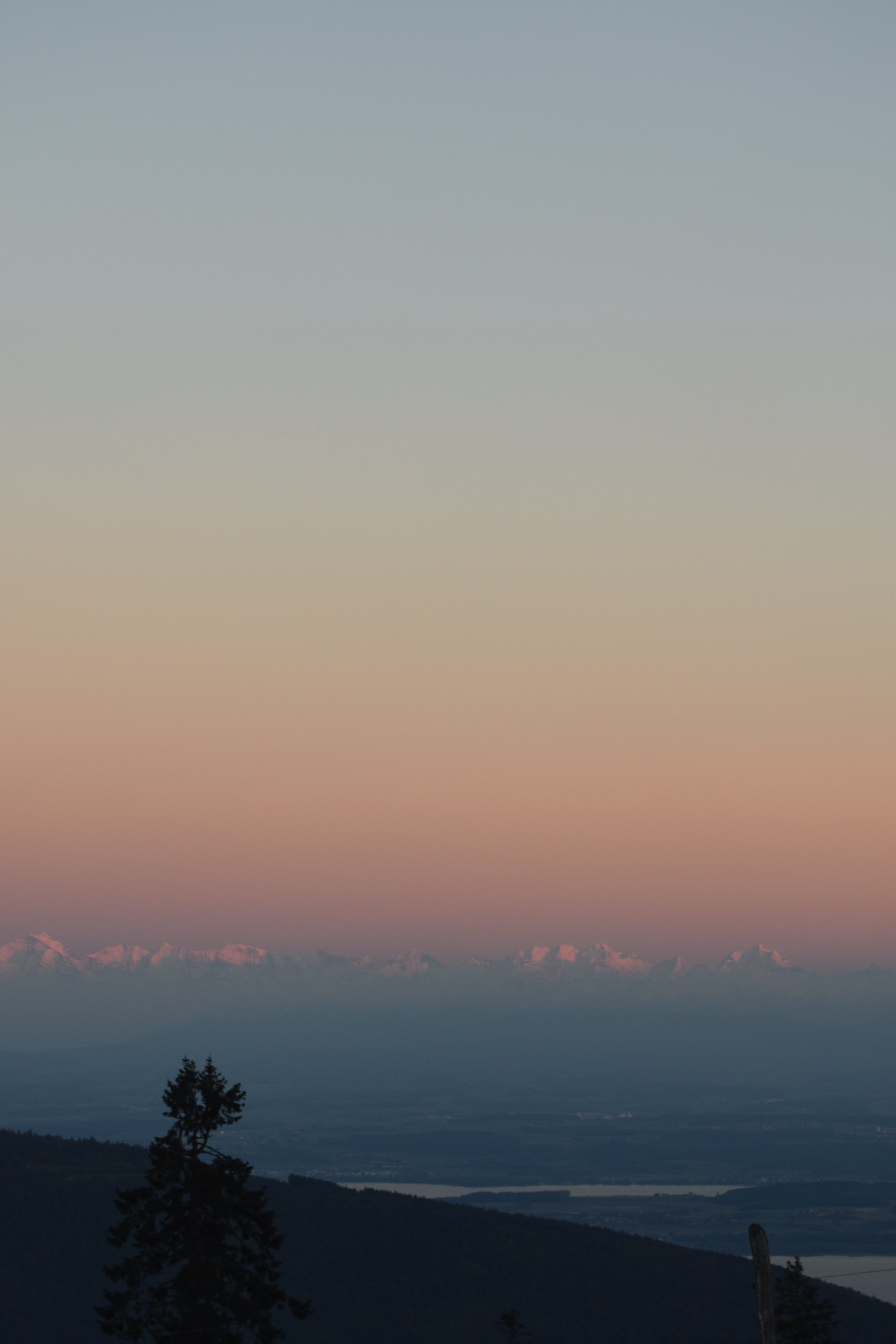 Aussicht vom Tête de Ran in Richtung Alpen kurz vor Sonnenuntergang